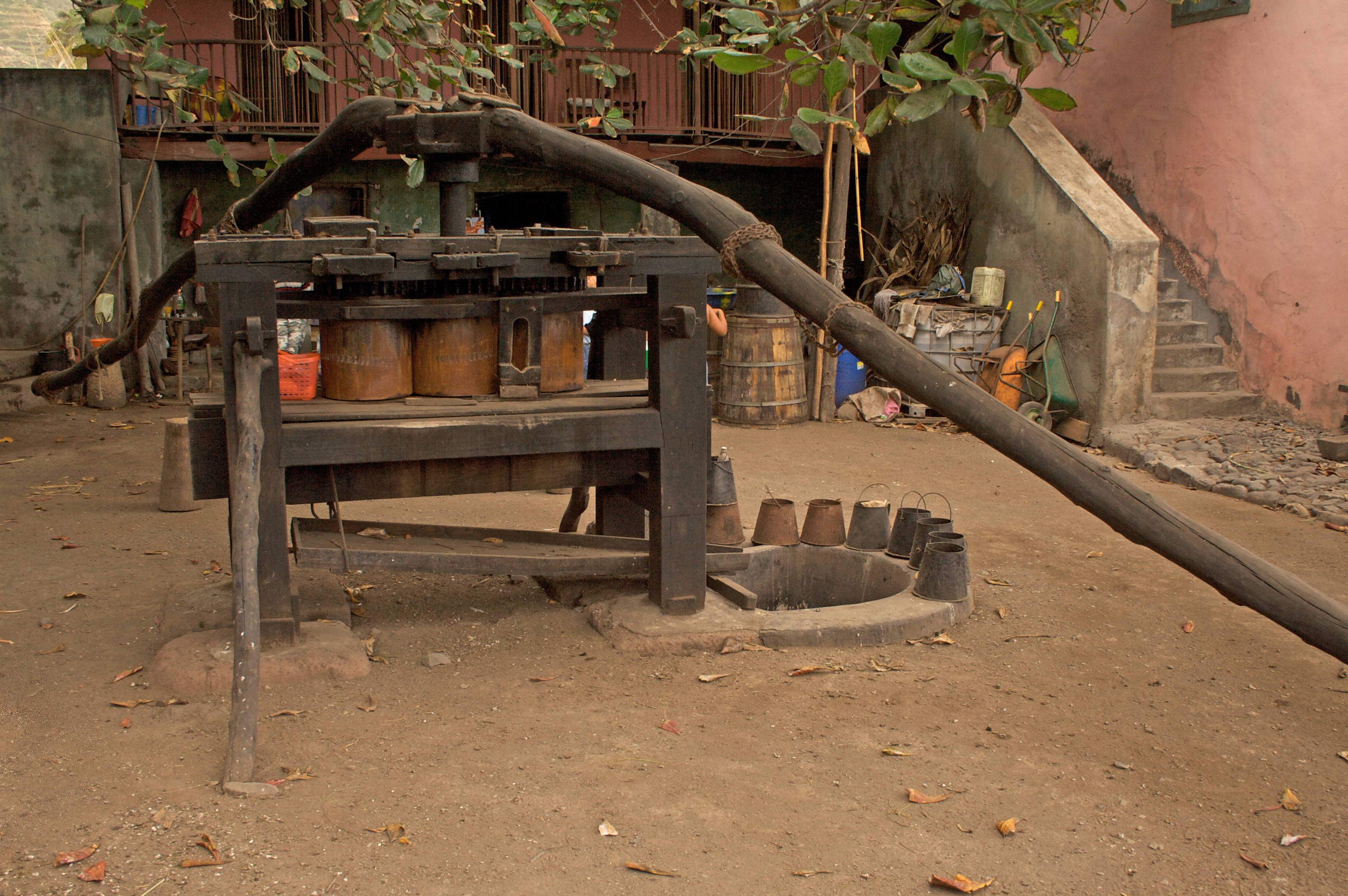 Trapiche à Vila das Pombas [1]